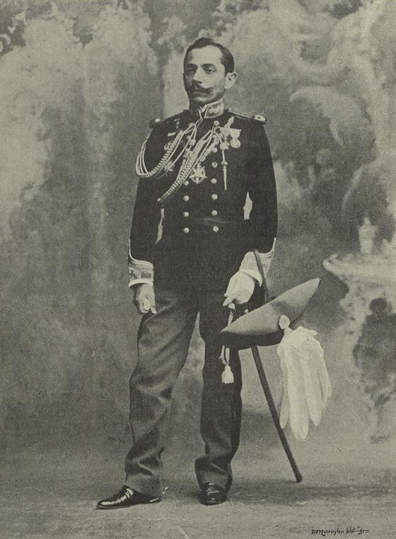 Tenente-coronel Alves Roçadas (1865-1926)